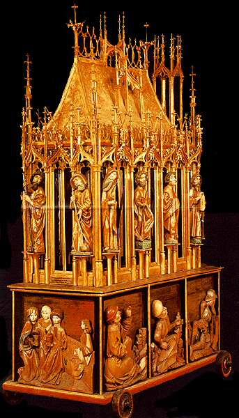 A garamszentbenedeki úrkoporsó az esztergomi Keresztény Múzeumban